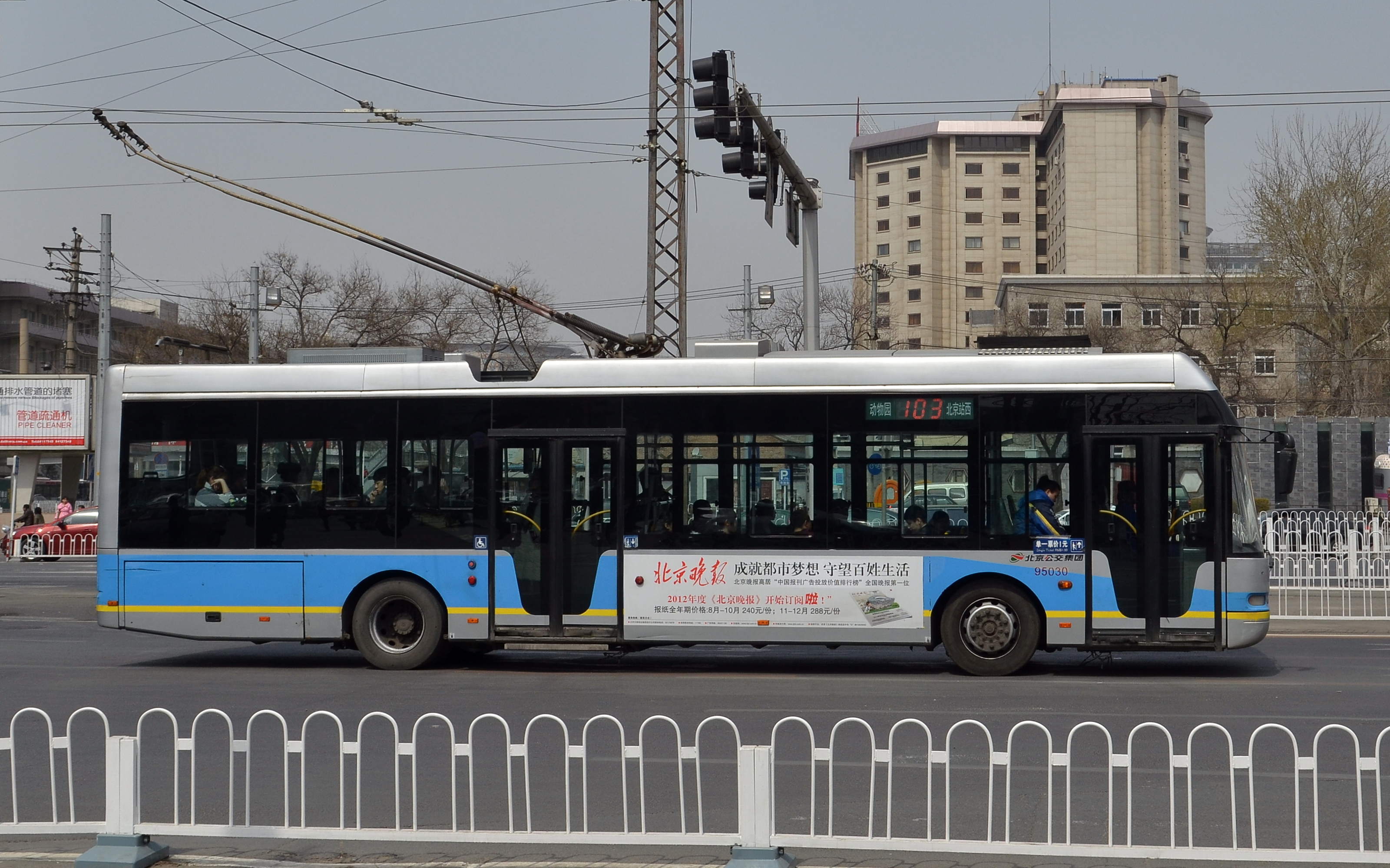 北京公交103路BJDWG120N型电车，北京电车制配厂/金华尼奥普兰/株洲电力机车研究所联合制造